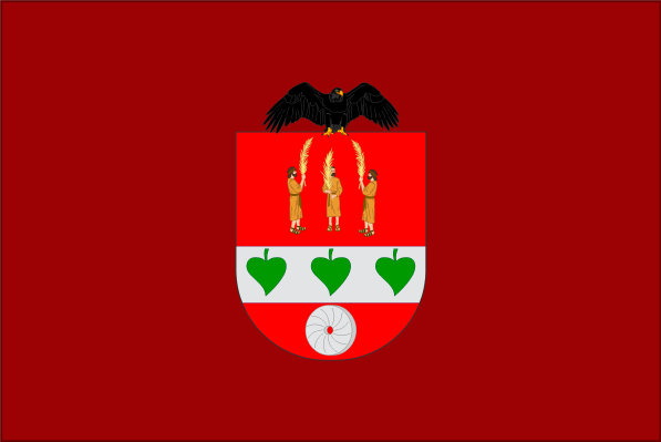 3X2ko ikurra. Gorrimin kolorekoa eta erdian herriaren armarria.